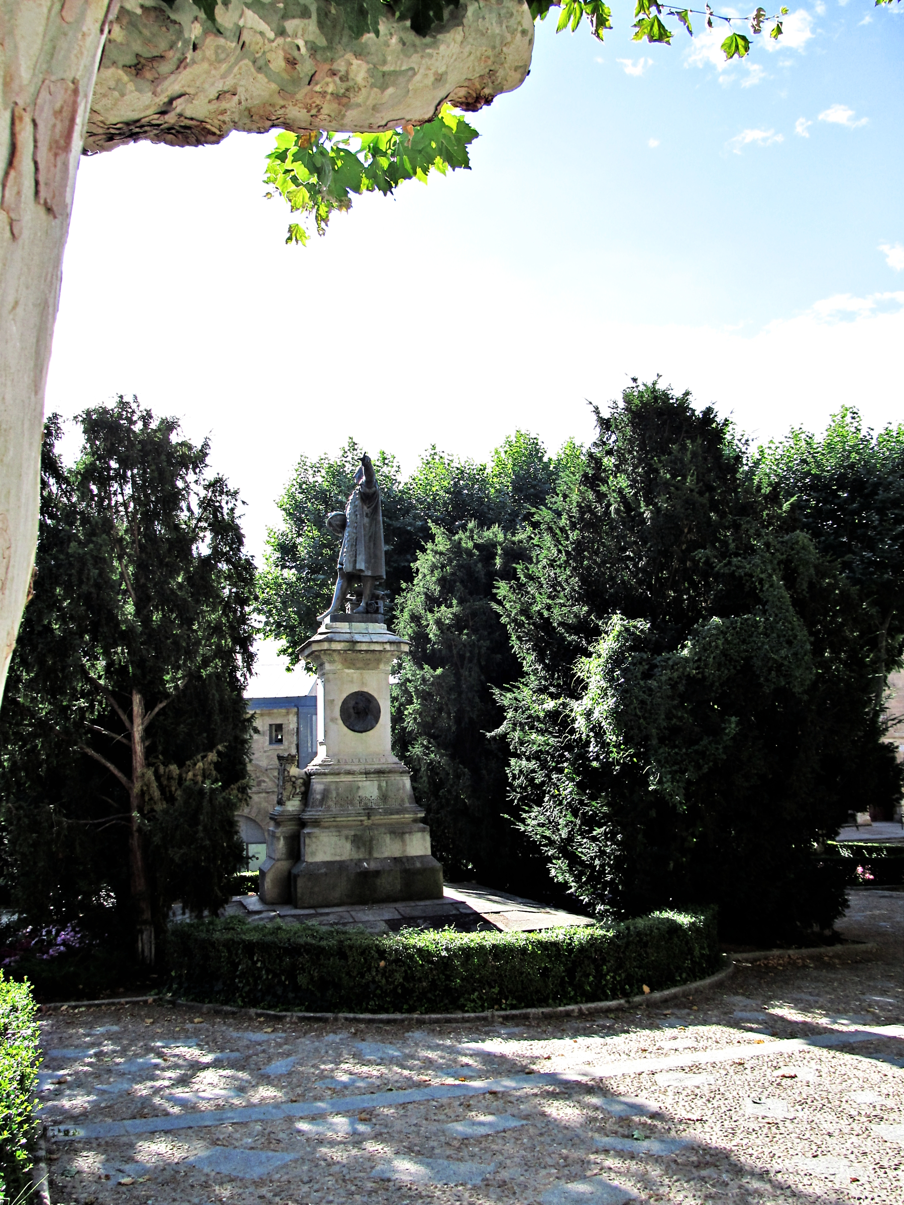 Monumento a Colón, Salamanca (España) agosto 2013